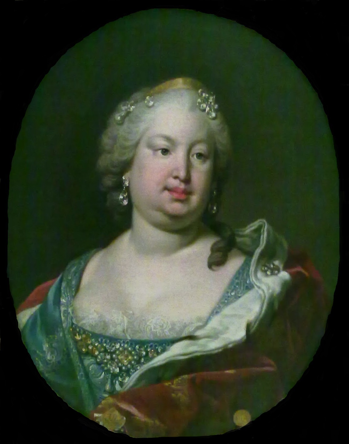 Retrato de la reina Bárbara de Braganza (1711-1758), que fue reina consorte de España por su matrimonio con Fernando VI de España.